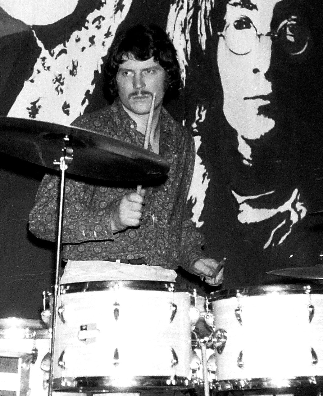 Pásztory Zoltán (Mosonmagyaróvár, 1944. október 31. – Budapest, 2005. május 1.) magyar dobos, az Illés együttes dobosa. 2000-ben Kossuth-díjat kapott megosztva az Illés-együttessel.